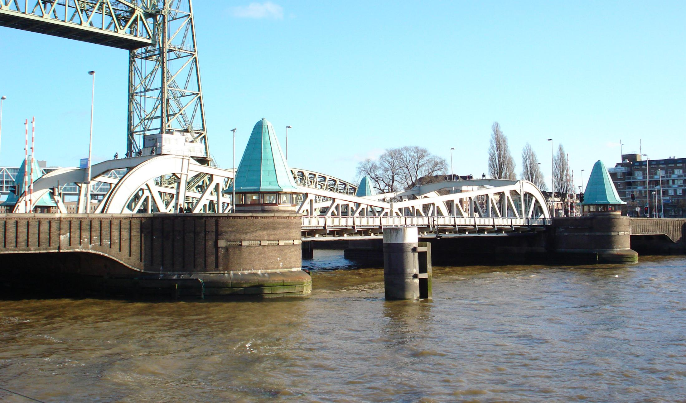 Rotterdam, Koninginnebrug. Rijksmonument.